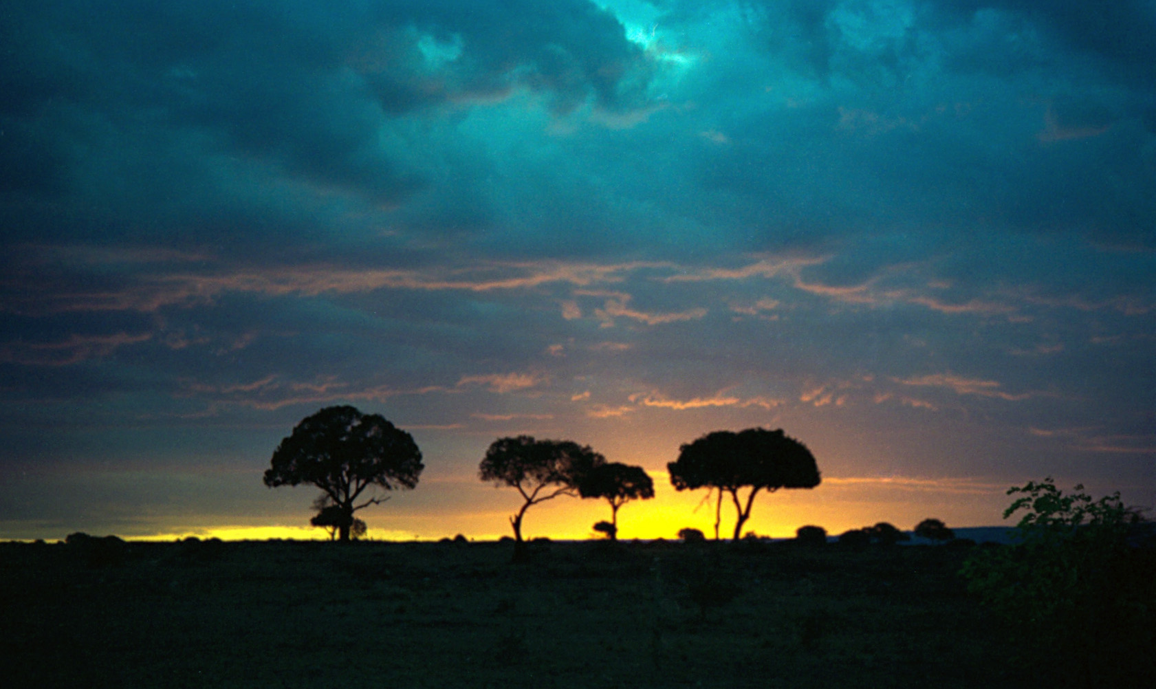 Sunset silhouetting acacia trees in Masai Mara, Kenya, 1993.1993 #158-11A Masai Mara sunset